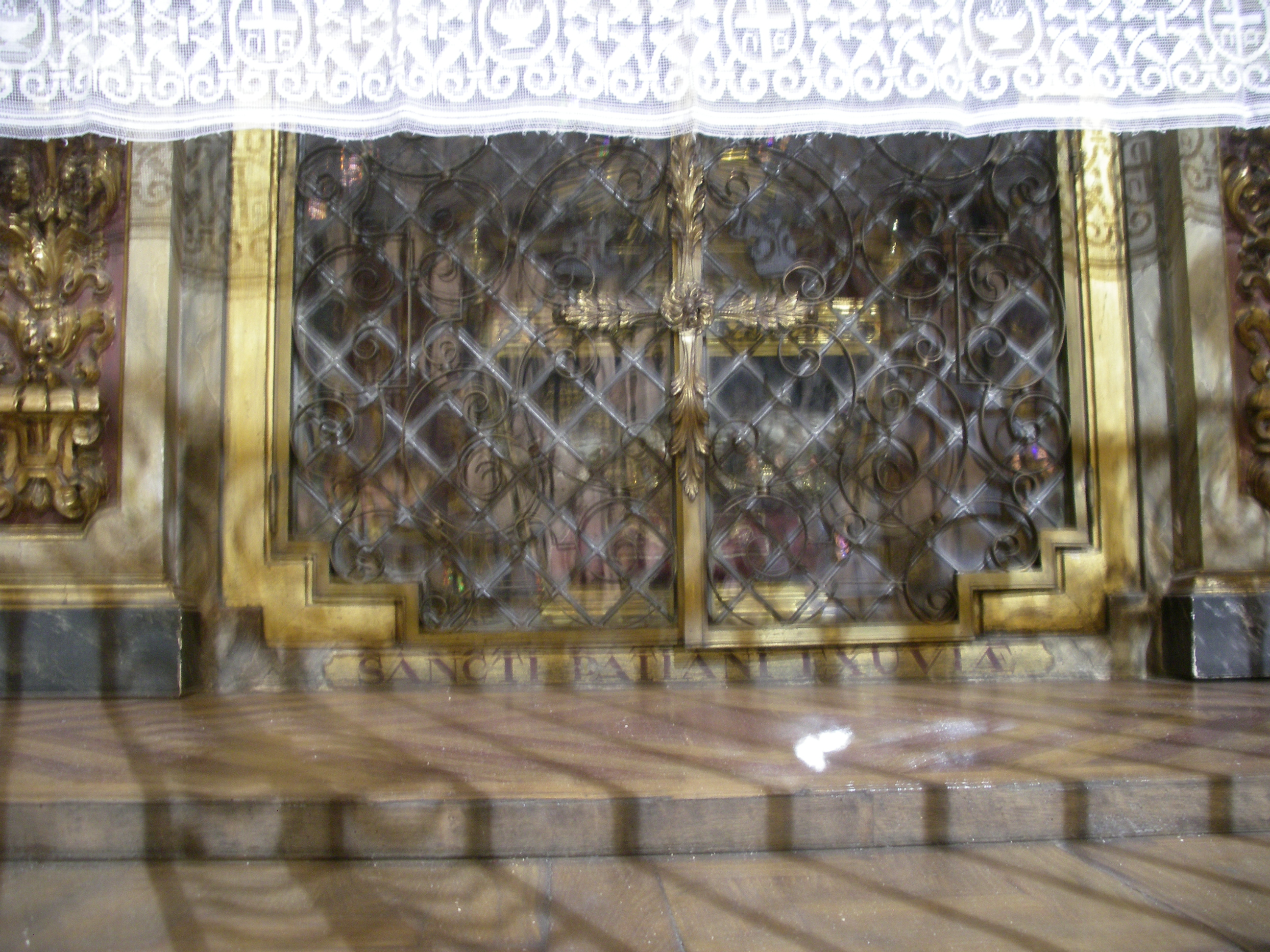 Urna amb les restes de Sant Pacià, s. XVIII, a l'Església dels sants Just i Pastor de Barcelona